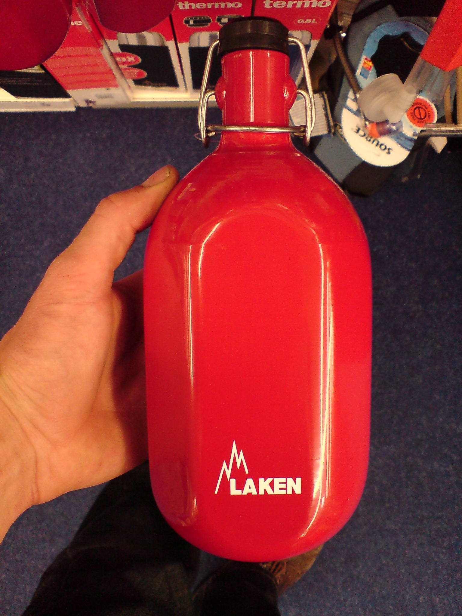 Il s'agit d'une gourde en métal de marque Laken